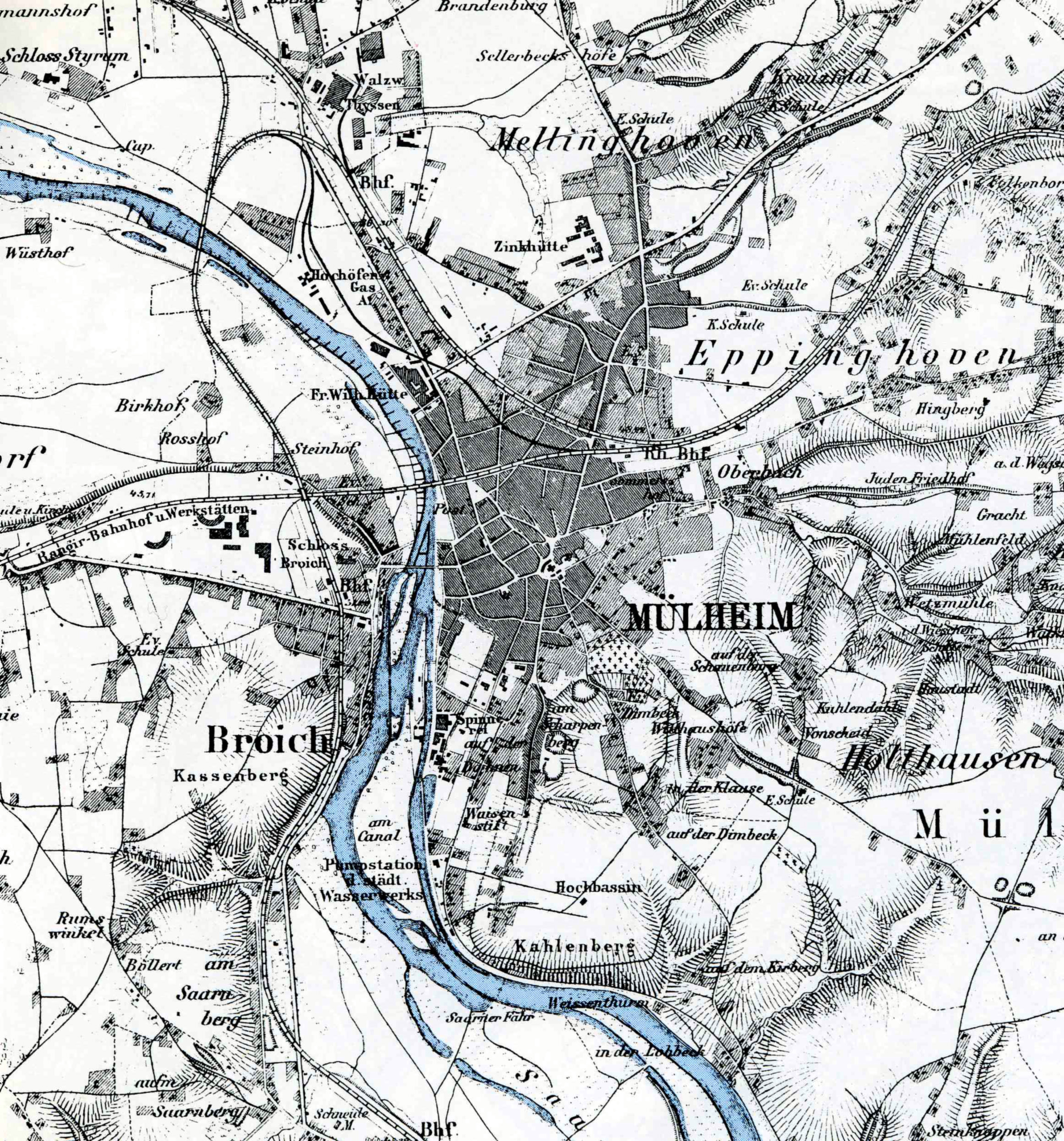 Topographische Karte der Stadt Mülheim an der Ruhr und des Landkreis Mülheim an der Ruhr